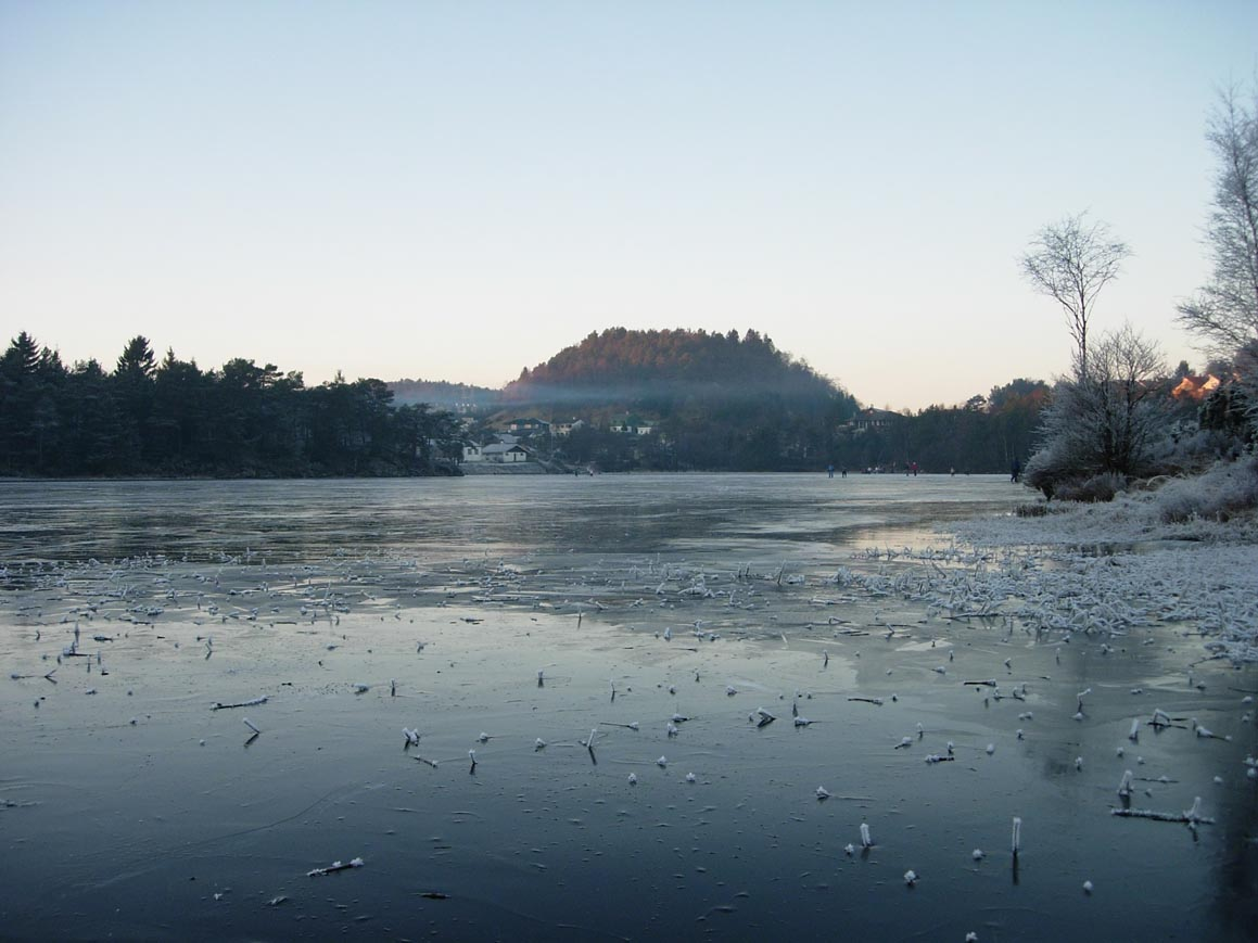 Skranevannet, Sandsli, Bergen. Vinter - isdekket. Utsikt mot nord.